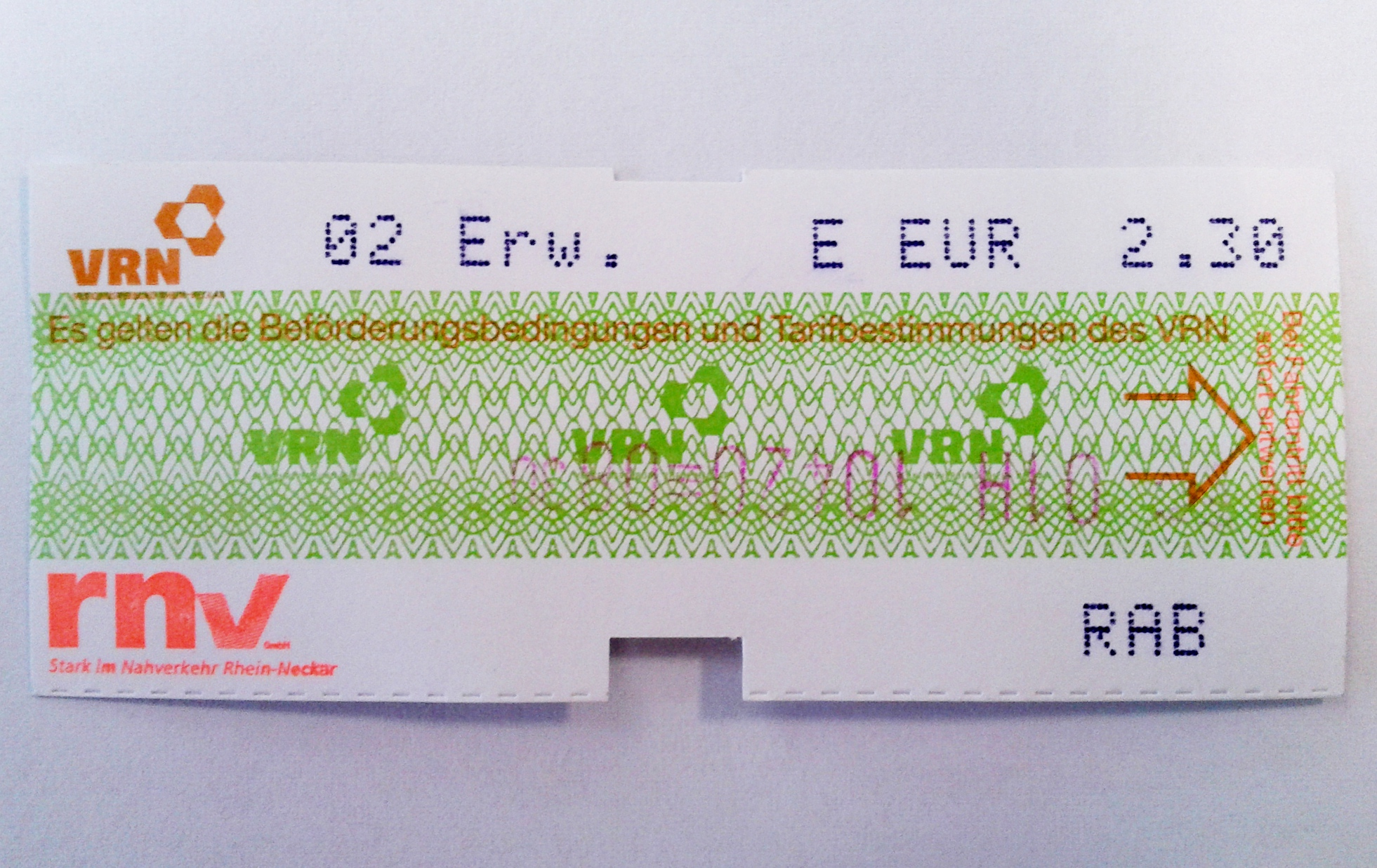 VRN-Ticket in Mannheim in der Linie 1 abgestempelt